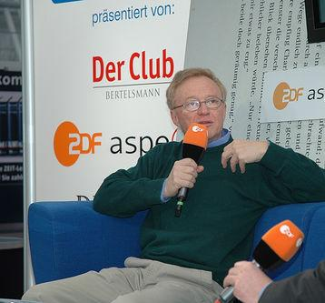 David Grossman en wikipedia: David Grossman he wikipedia: דויד גרוסמן